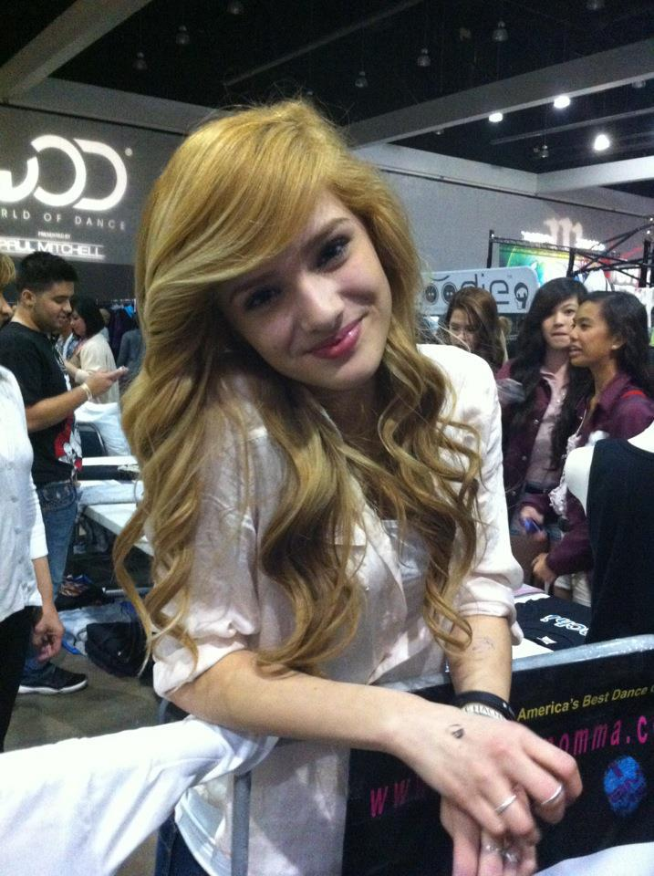 Olivia Chachi Gonzales